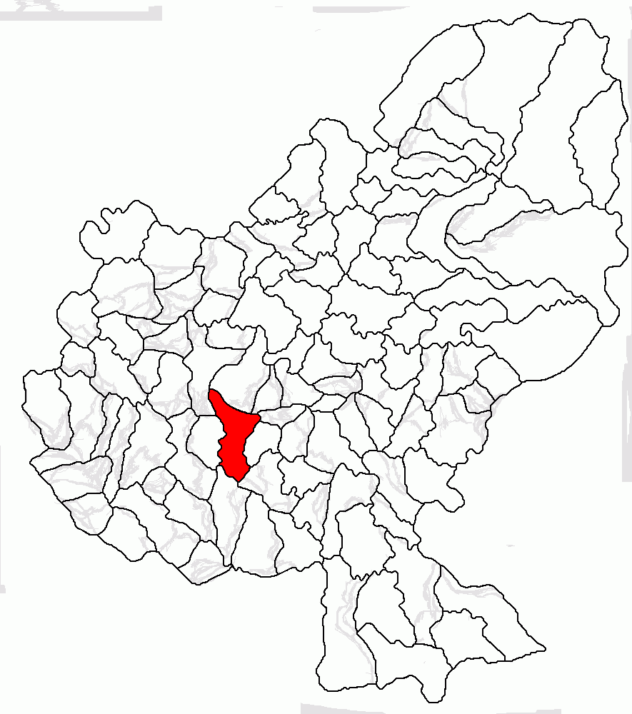 Categorie:Hărţi ale judeţului Mureş